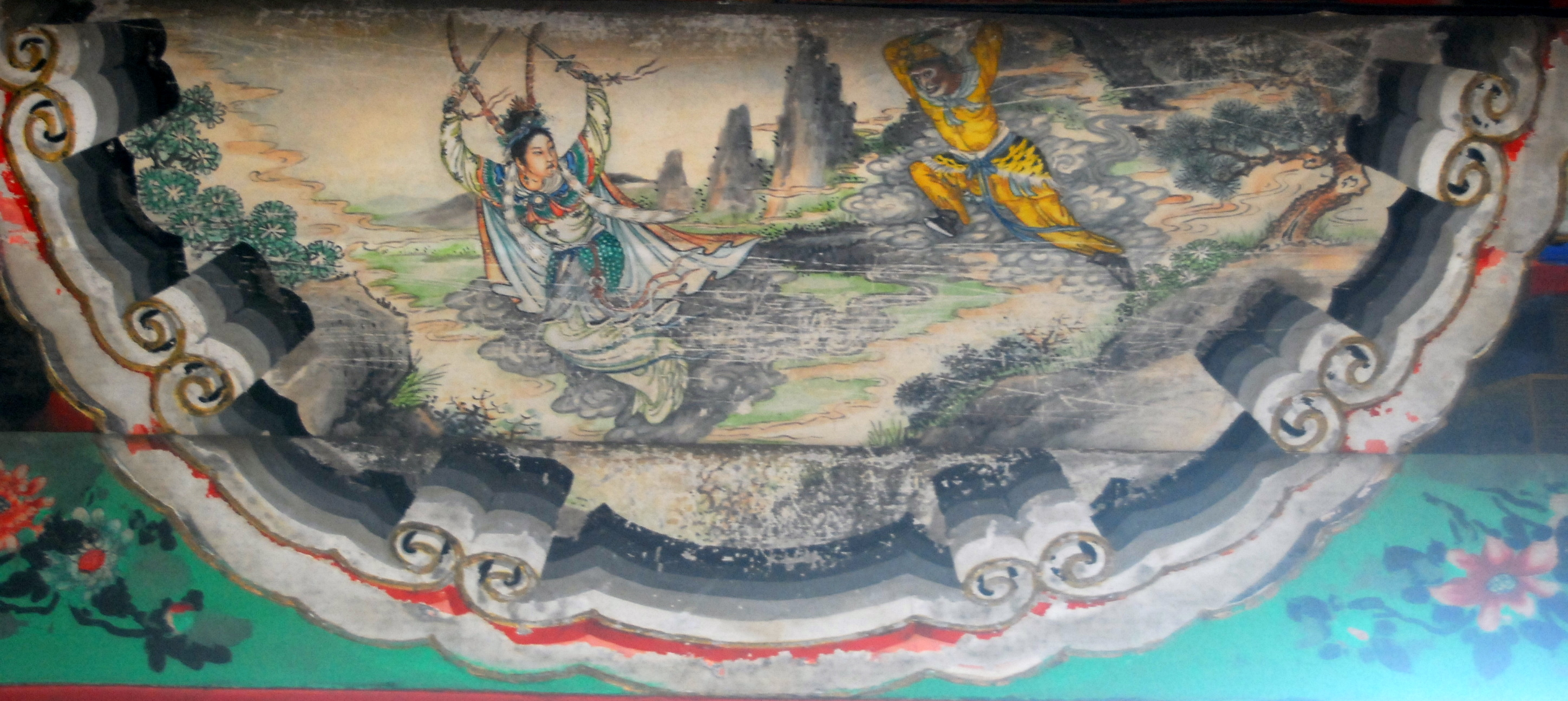 颐和园长廊上的彩绘：西游记三借芭蕉扇情节：铁扇公主被孙悟空打败